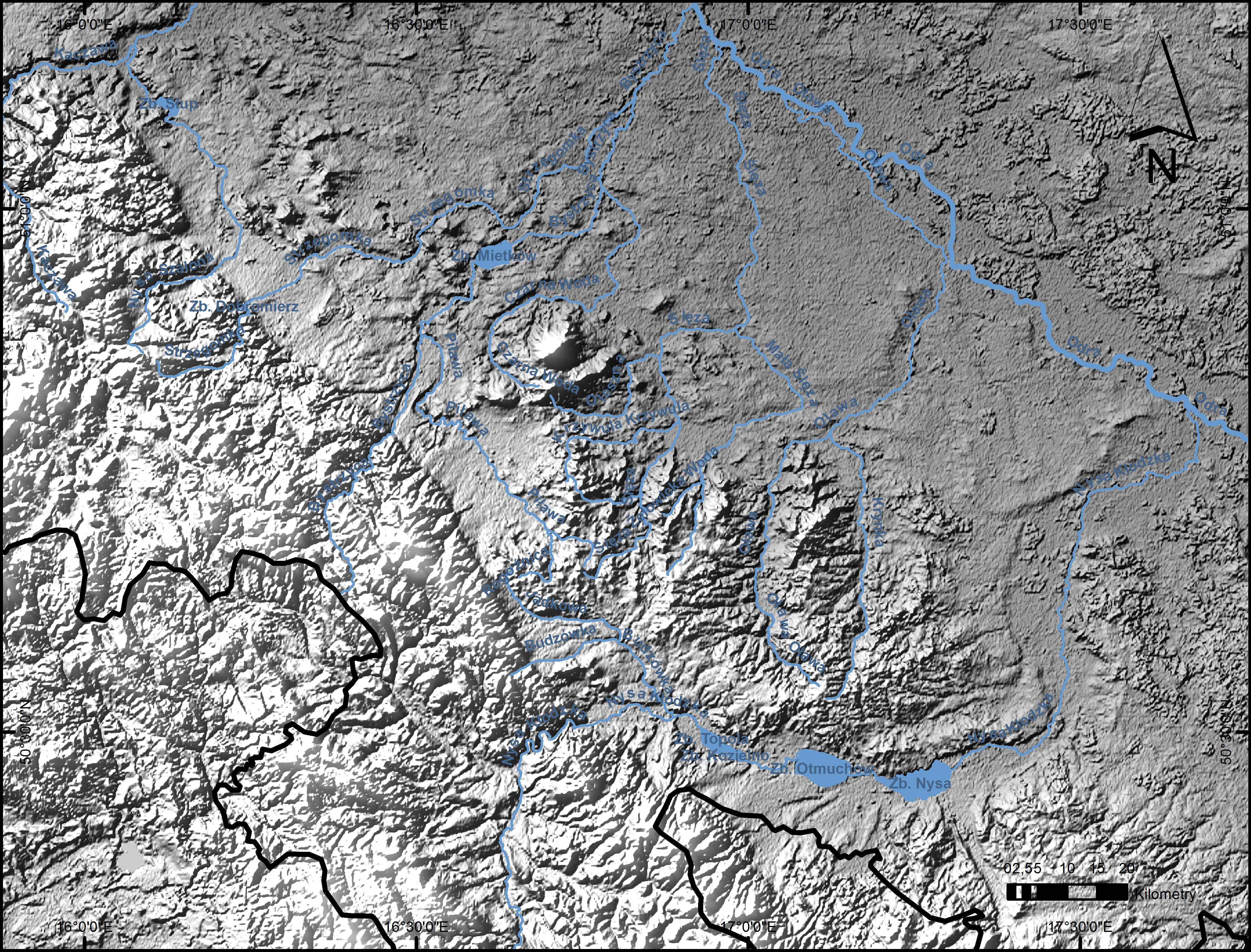 Przedgórze Sudeckie (relief + wody)